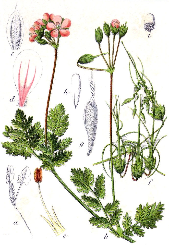 Erodium cicutarium (L.) L'Hér. s. str. Original Caption Gemeiner Reiherschnabel, Erodium cicutarium